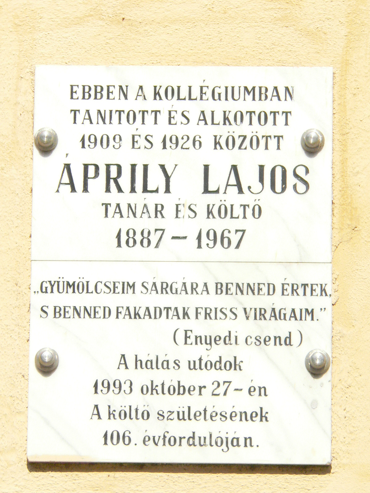 Áprily Lajos emléktáblája Nagyenyeden